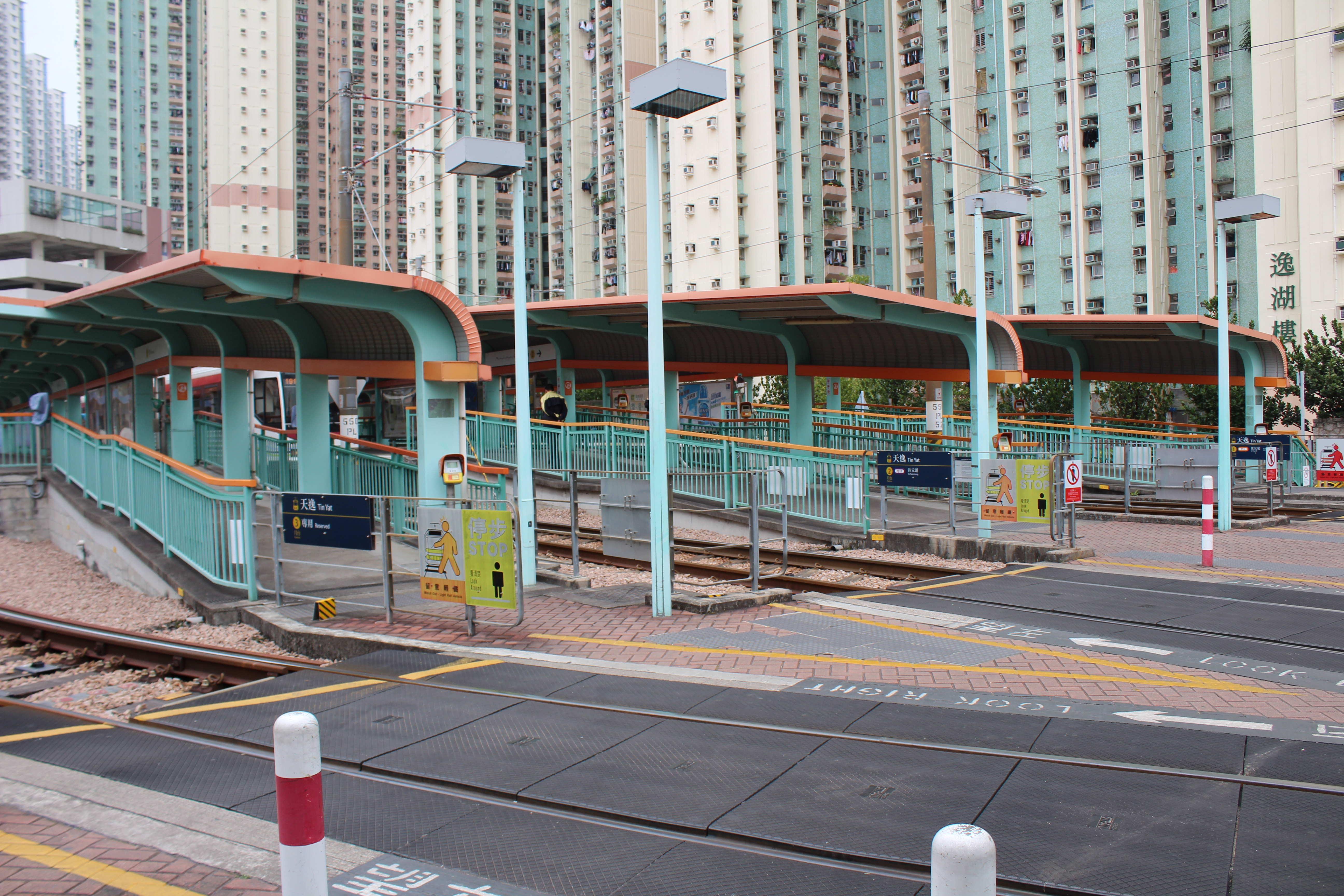 天逸站1至3號月台